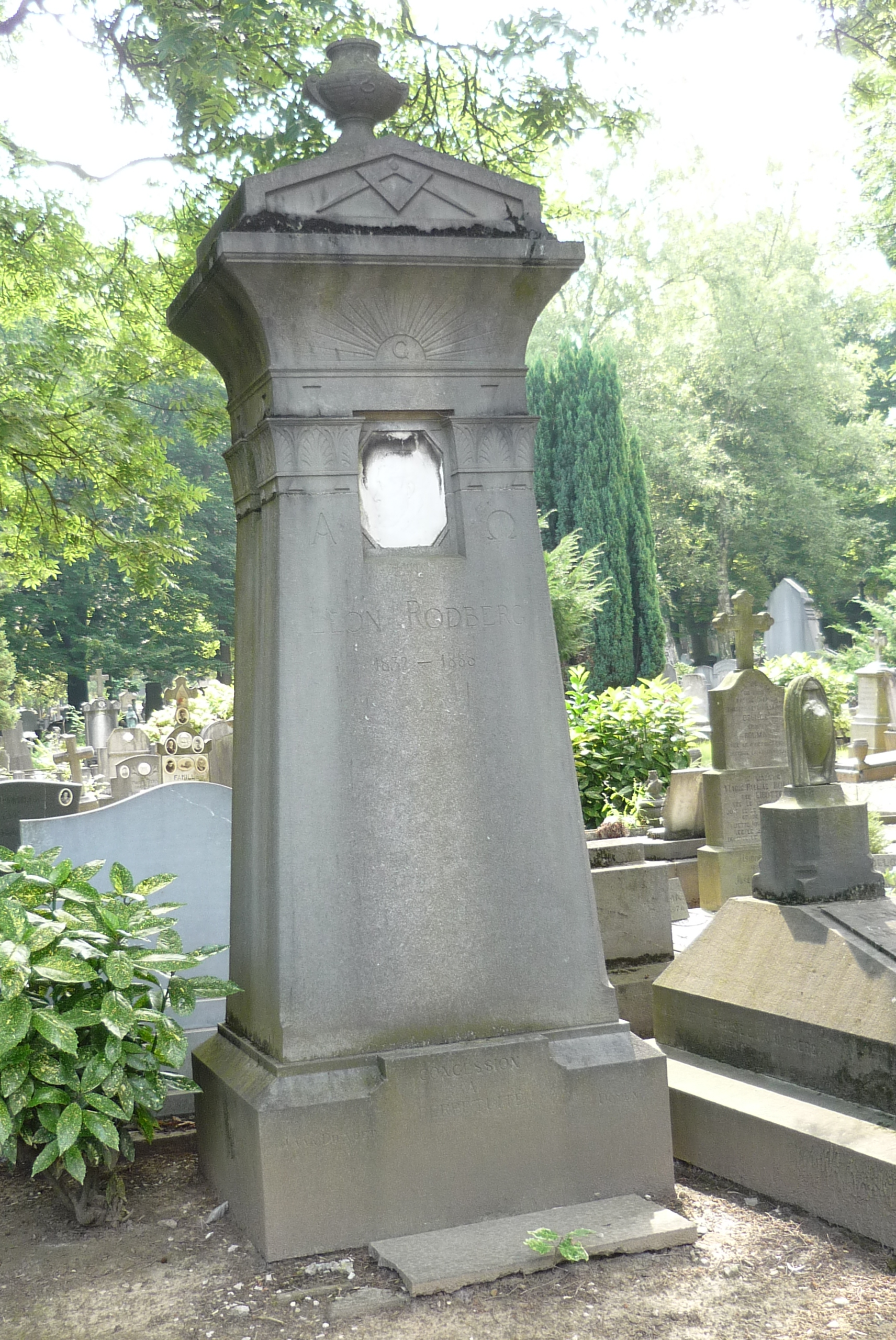 Tombe de style Art-nouveau de Léon Rodberg, vice consul de Belgique, né à Ensival le 24 octobre 1832 et mort à Florence (Italie) le 17 mars 1888, époux de Marie Rosalie Joséphine Françoise Hanicq née à Malines le 10 octobre 1841, par l'architecte Henri van Dievoet, vers 1890. Cimetière de Robermont à Liège, tombe numéro 5625, parcelle 56-36-7. Cette tombe est située à côté de la tombe de la famille Rodberg-Martiny, où reposent également: M. E. Martiny, décédée à 70 ans le 3 juillet 1833; L. A. J. Rodberg décédé à 74 ans le 7 juillet 1839; Félix Rodberg décédé à 43 ans le 3 septembre 1841; Gustave Rodberg décédé à 5 ans le 12 février 1842 et Denis Napoléon Rodberg décédé à 79 ans le 14 mars 1888.